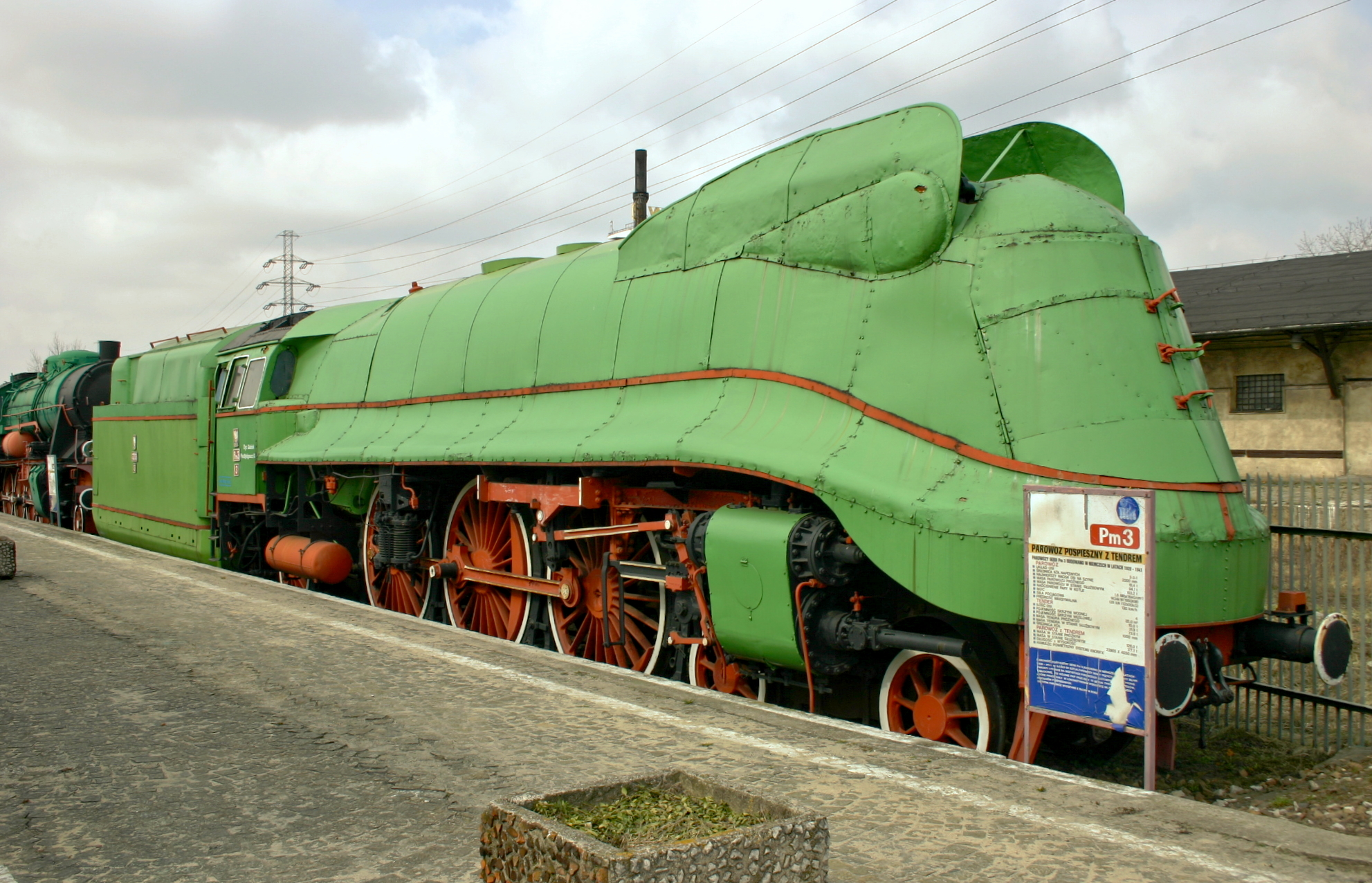 Dampflokomotive Pm 3-5 als Pm 3-3 mit Tender 32D3-3 Warszawa Muzeum Kolejnictwa